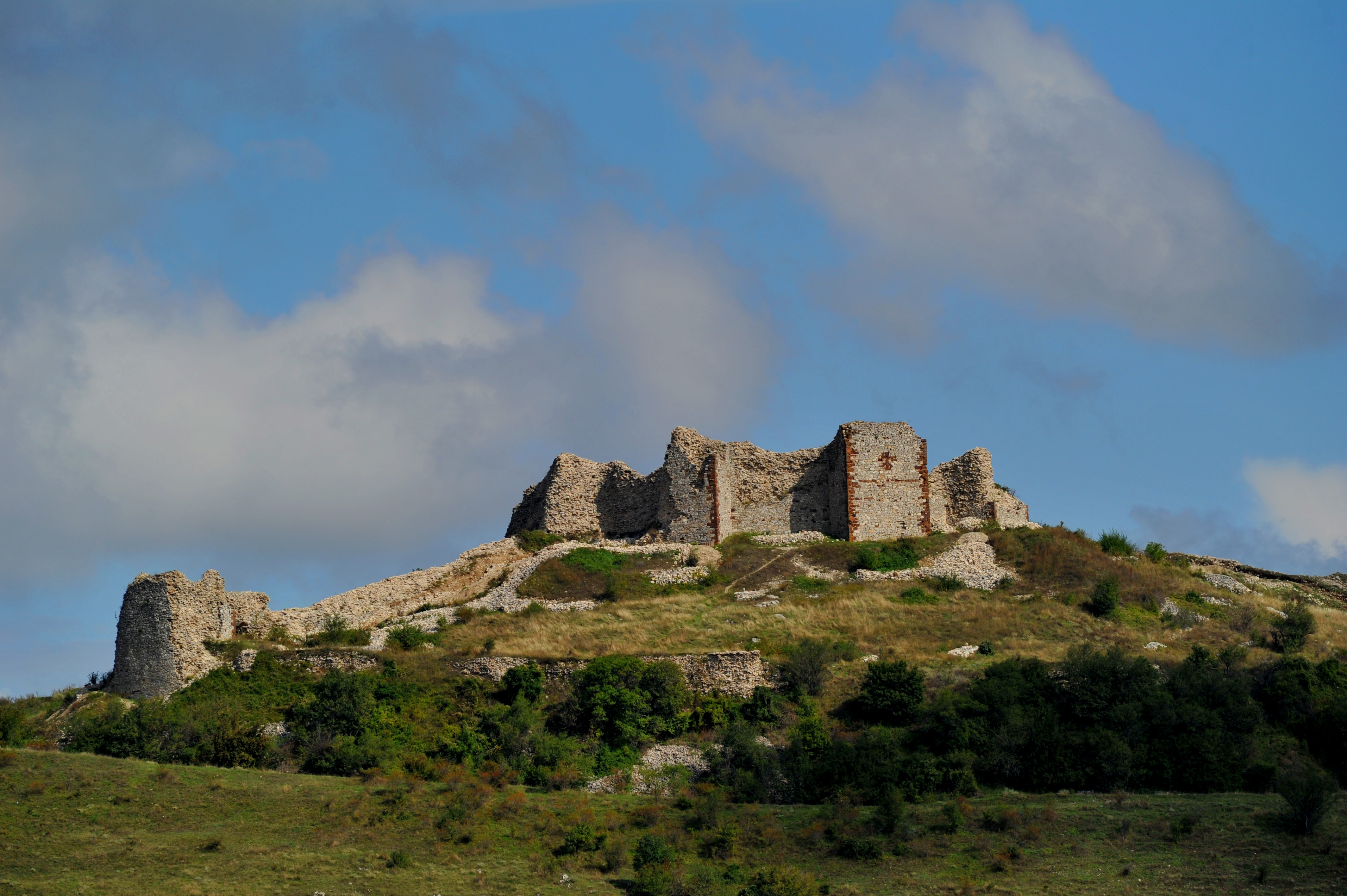 Qyteti Mesjetar i Novobërdës